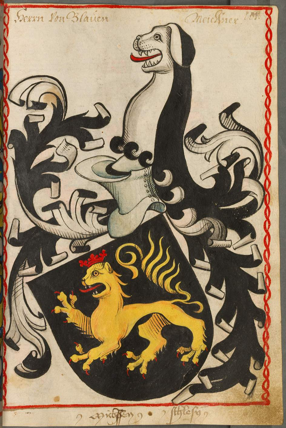 Scheibler'sches Wappenbuch , älterer Teil; Seite 101 Herrn von Blauen Meißner